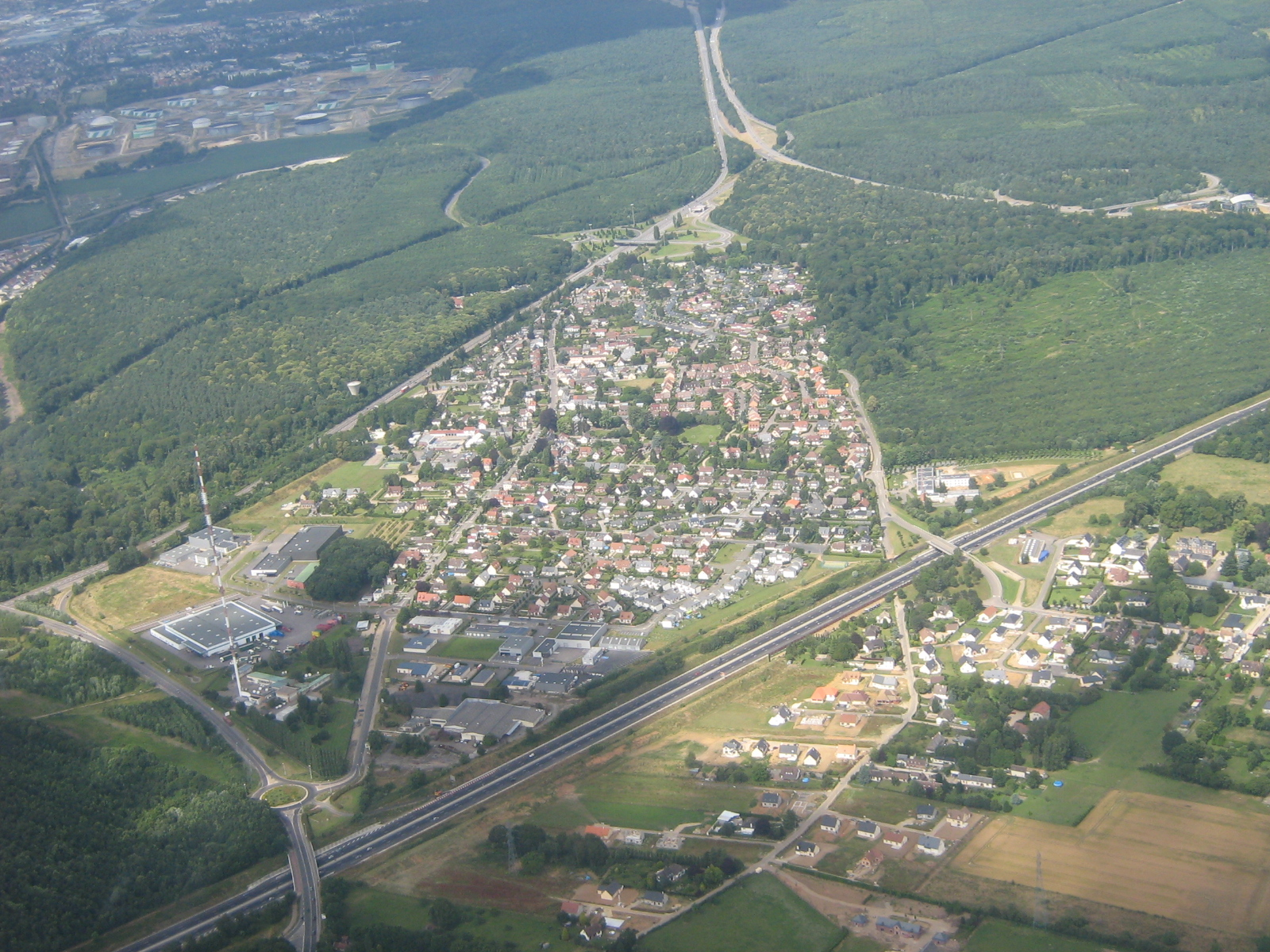 Vue d'avion de la ville des Essarts- Seine-maritime